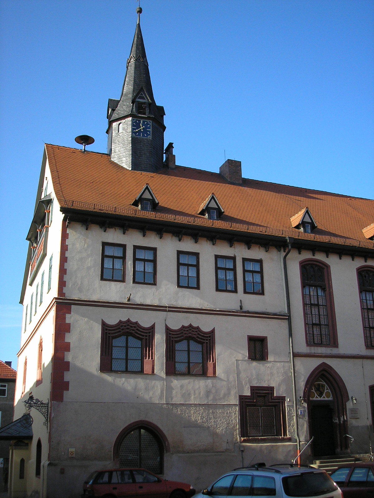 Das Rathaus in Orlamünde (Thüringen)